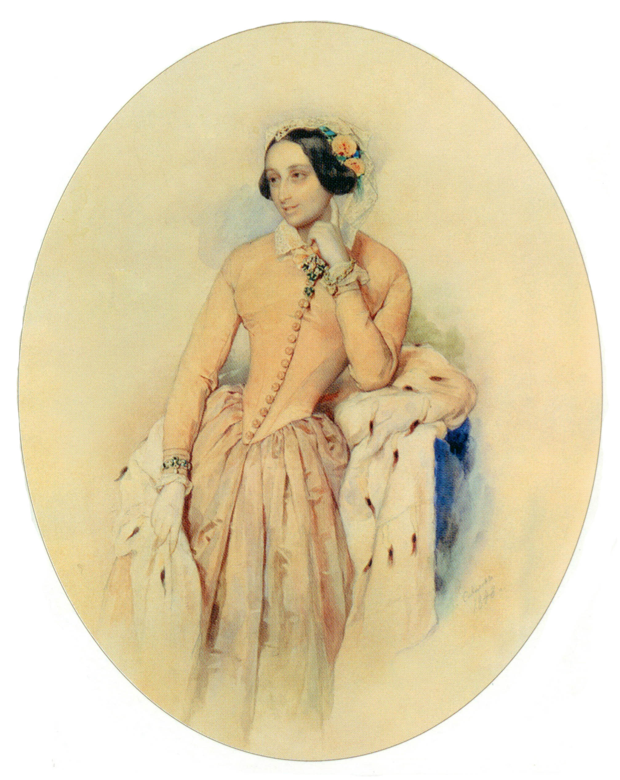 Княгиня Софья Васильевна Мещерская, ур. Оболенская (1822—1891), дочь генерала В. П. Оболенского (1780-1834), с 1843 года замужем за кн. Б. В. Мещерским (1818-1884).